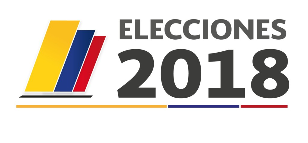 Logo Elecciones 2018 von Registradurìa-Nacional-del-Estado-Civil